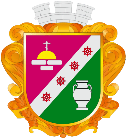 Герб смт Солоне